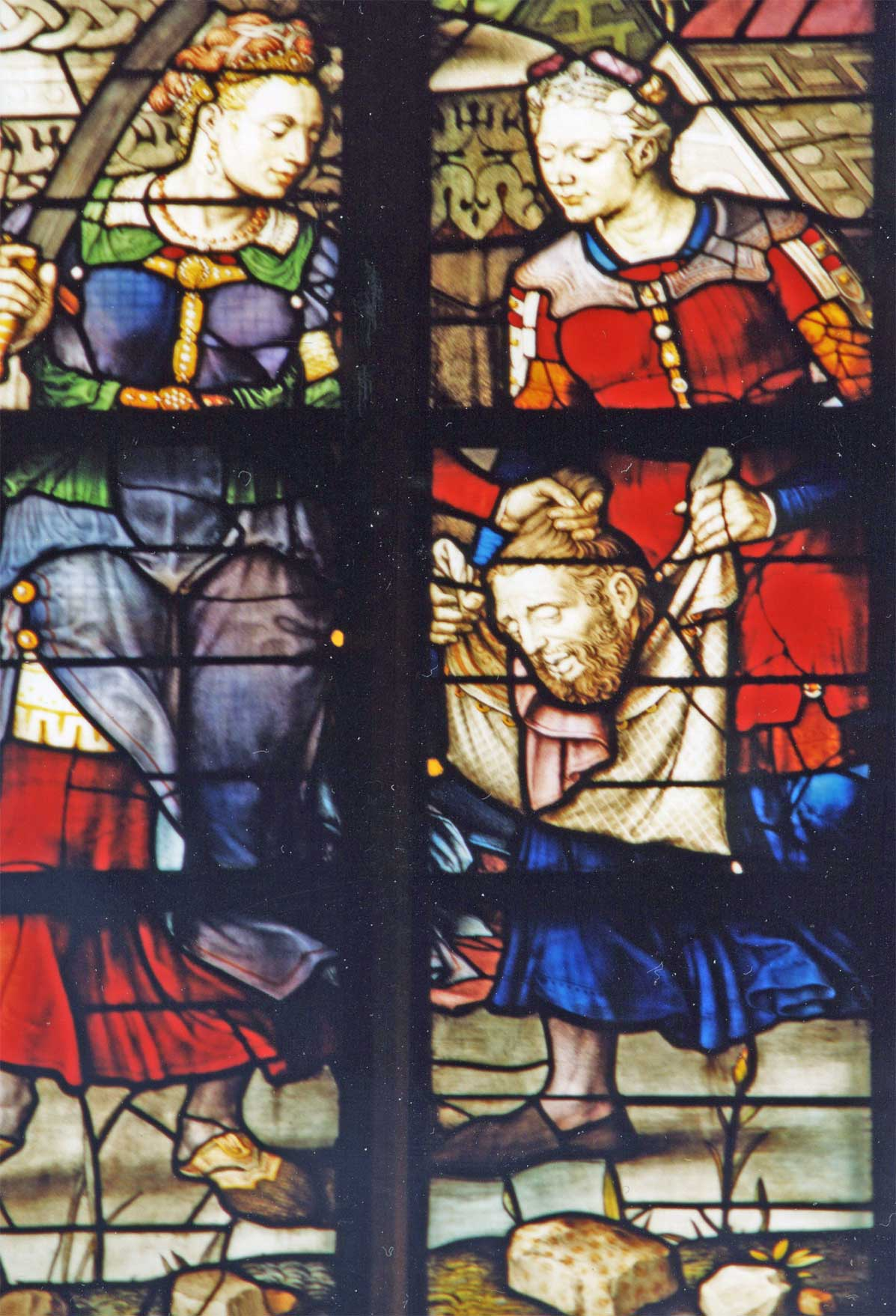 Fragment glas 6 van de St. Janskerk te Gouda : Judith onthoofdt Holofernes; maker Dirk Crabeth 1571